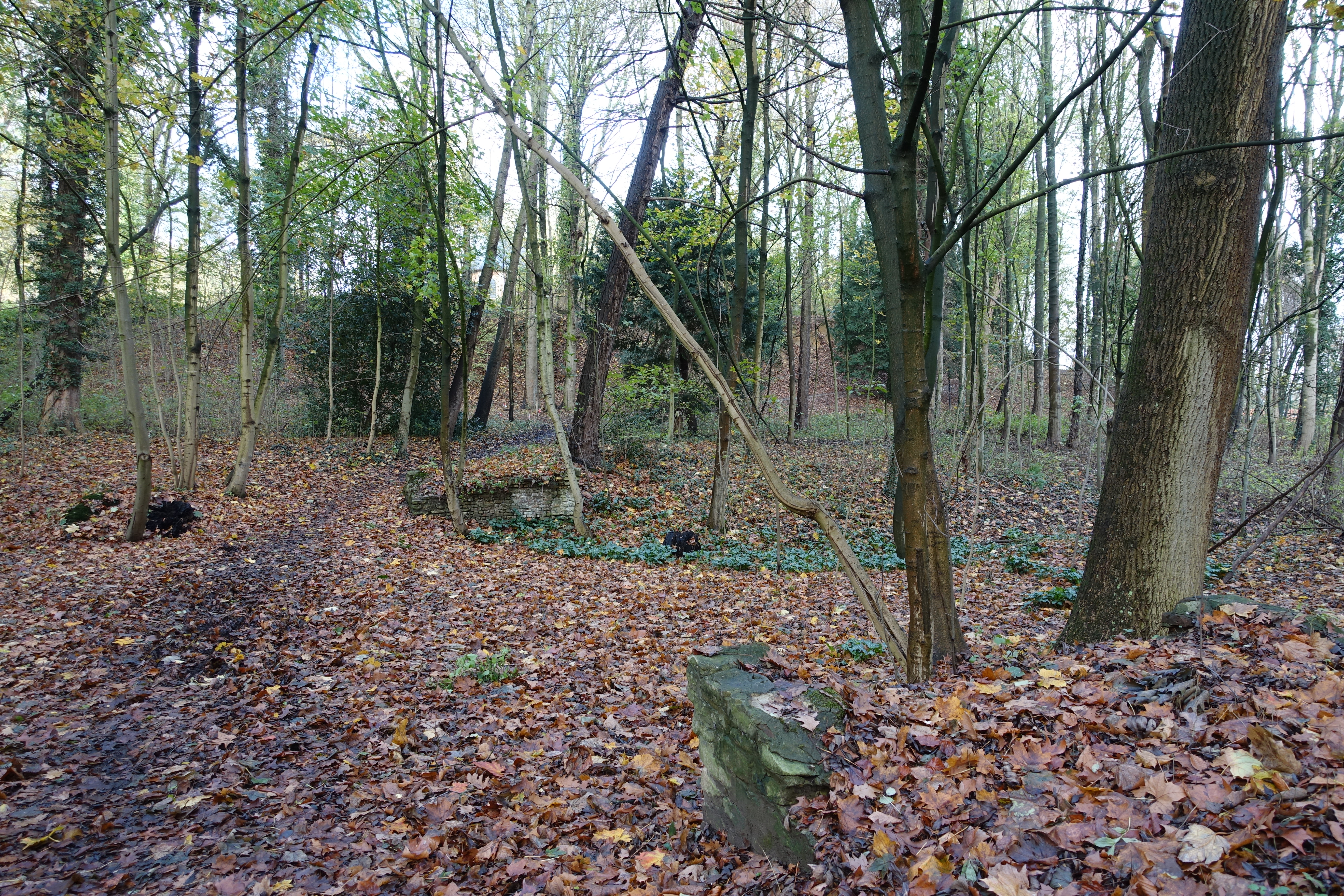 Restanten van de brug op het domein L'ecluse van Daniel Campion. Vandaag Domein Drie Fonteinen, brugweg. Lendrikkapel op de achtergrond zichtbaar.